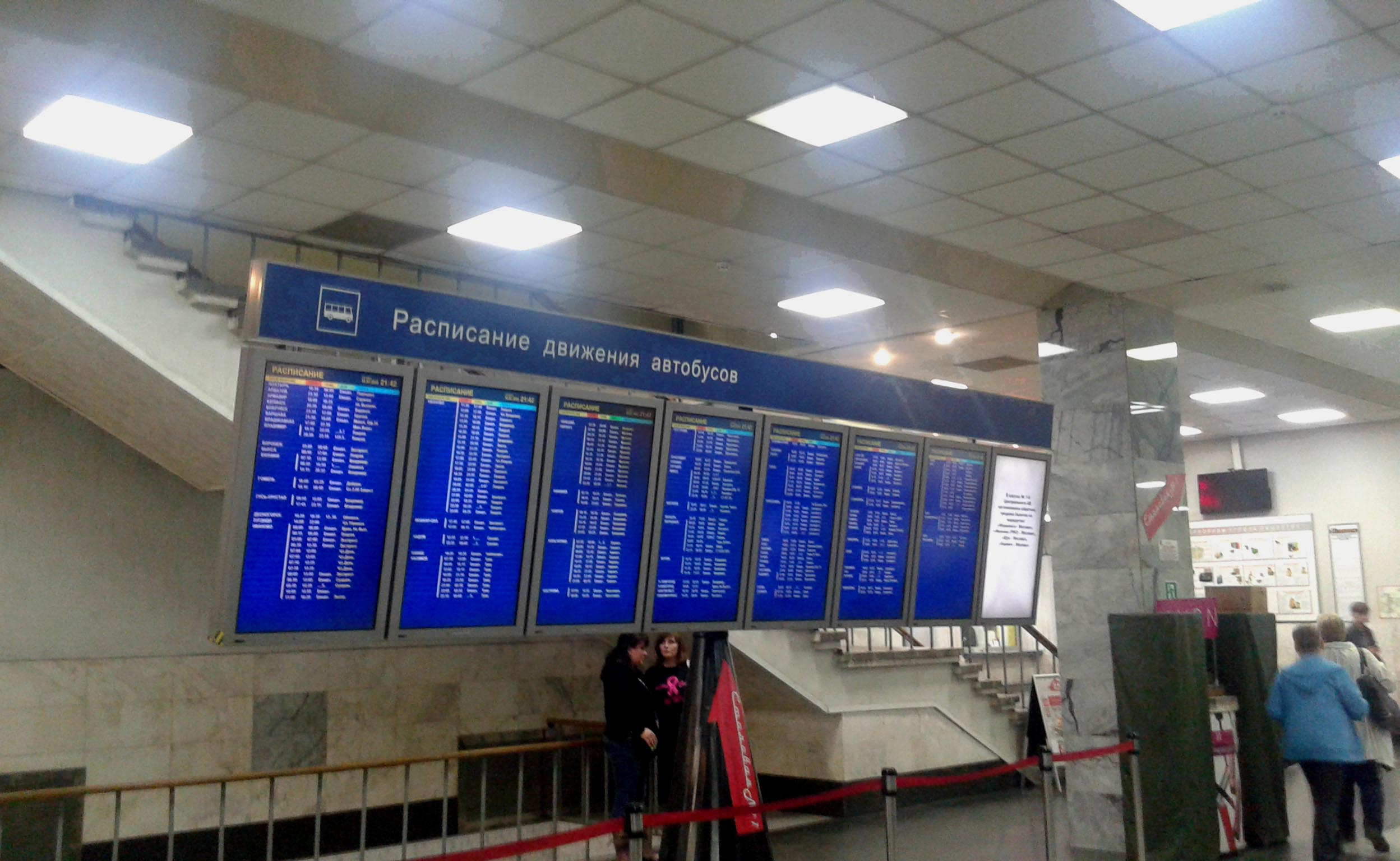 Московский (Центральный или Щёлковский) автобусный вокзал. Расписание в зале ожидания на 1 этаже.